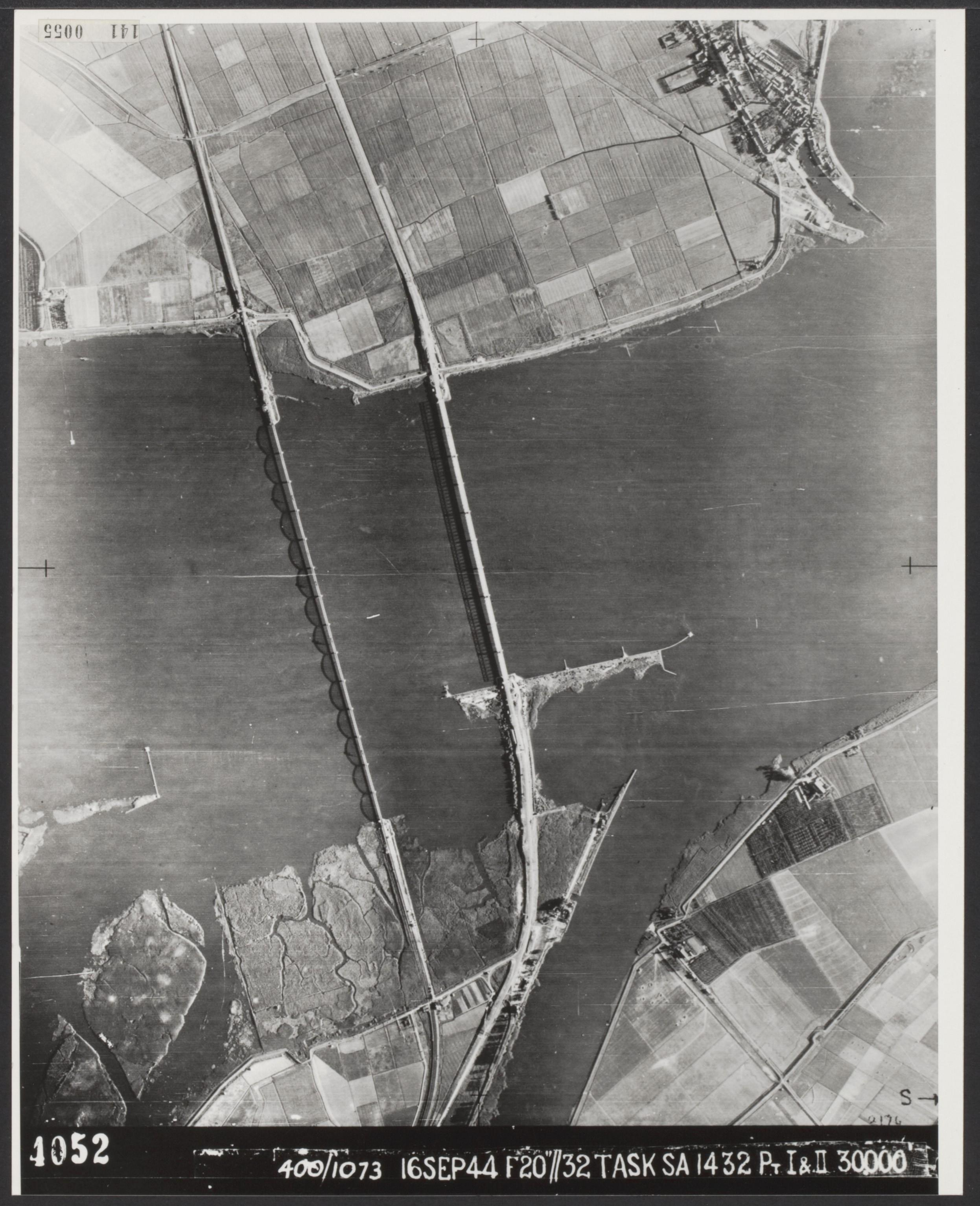 Luchtopname. Moerdijkbruggen voor het springen door de Duitsers